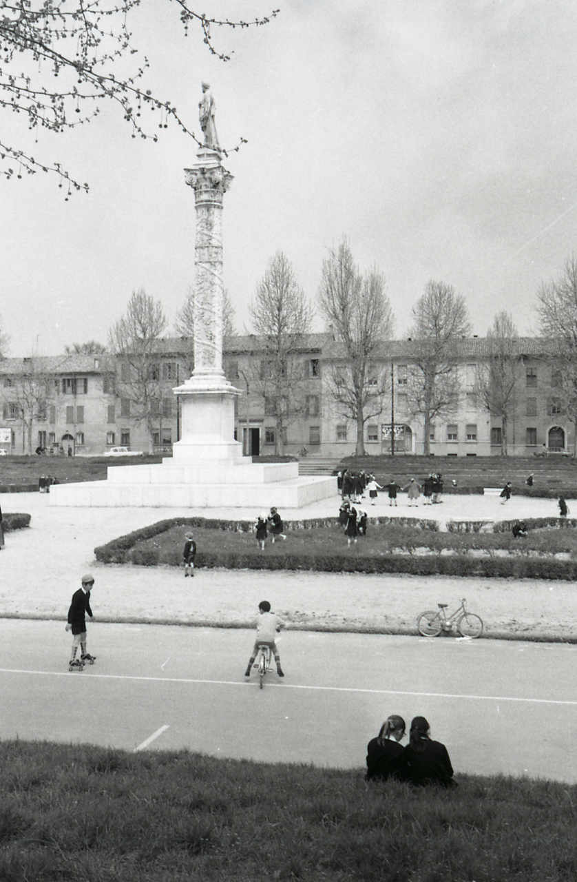 Servizio fotografico : Ferrara, 1969 / Paolo Monti. - Strisce: 7, Fotogrammi complessivi: 38 : Negativo b/n, gelatina bromuro d'argento/ pellicola ; 35 mm. - ((I fotogrammi hanno una doppia numerazione. . - Sul portanegativi: Nikon FP4. - Occasione: Documentazione per la pubblicaizone di: "Renzo RENZI (a cura di), Ferrara, Bologna, Edizioni Alfa, 1969". - Fonte: Agenda di Paolo Monti: Monti/ 3 aprile 1966 - 9 marzo 1971/ 12421-16823 (1966-1971), presso Archivio Paolo Monti. - Fonte: Monografia di Renzi, Renzo: Ferrara, Bologna, Edizioni Alfa (1969). - Fonte: Agenda di Paolo Monti: Monti - Agenda 1969 (1969), presso Archivio Paolo Monti